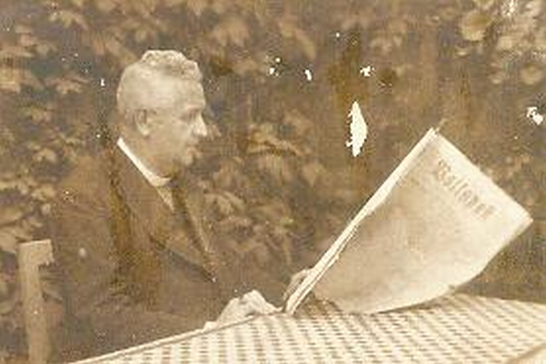 Kanovník Josef Funk, po roce 1900